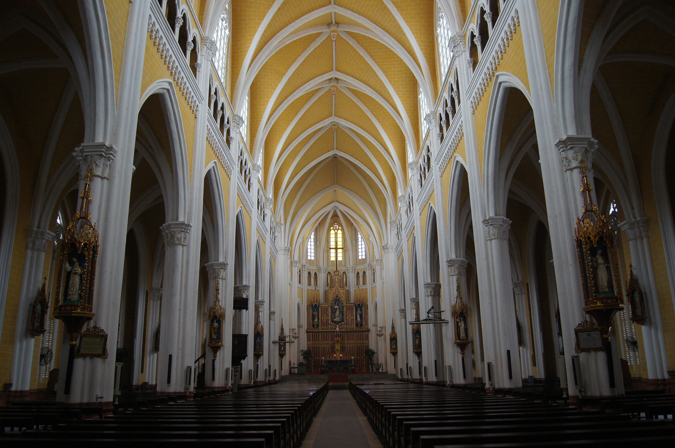 Bên trong nhà thớ Phú Nhai